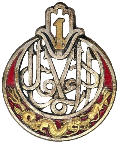 2e Bataillon de Marche du 1er R.T.A.